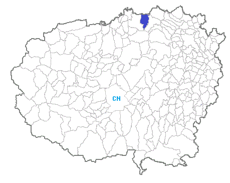 posizione del comune in provincia di Cuneo